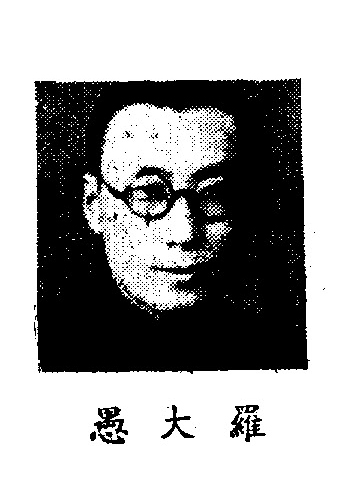 中文（中国大陆）: 制憲國民大會代表